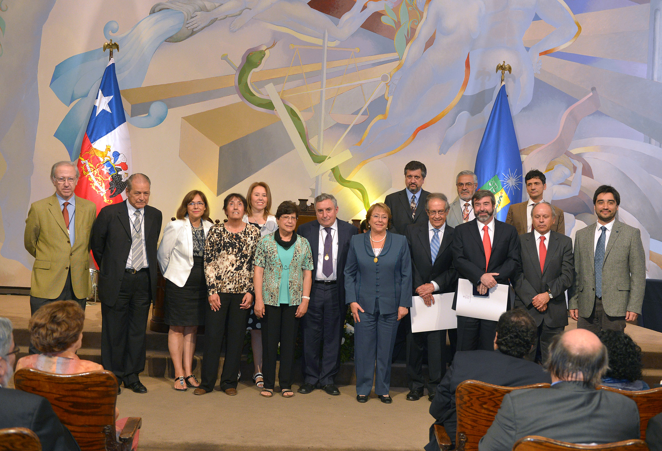 Michelle Bachelet encabezó la ceremonia de aniversario 172 de la Universidad de Chile. Foto en el Salón de Honot de la Casa Central.